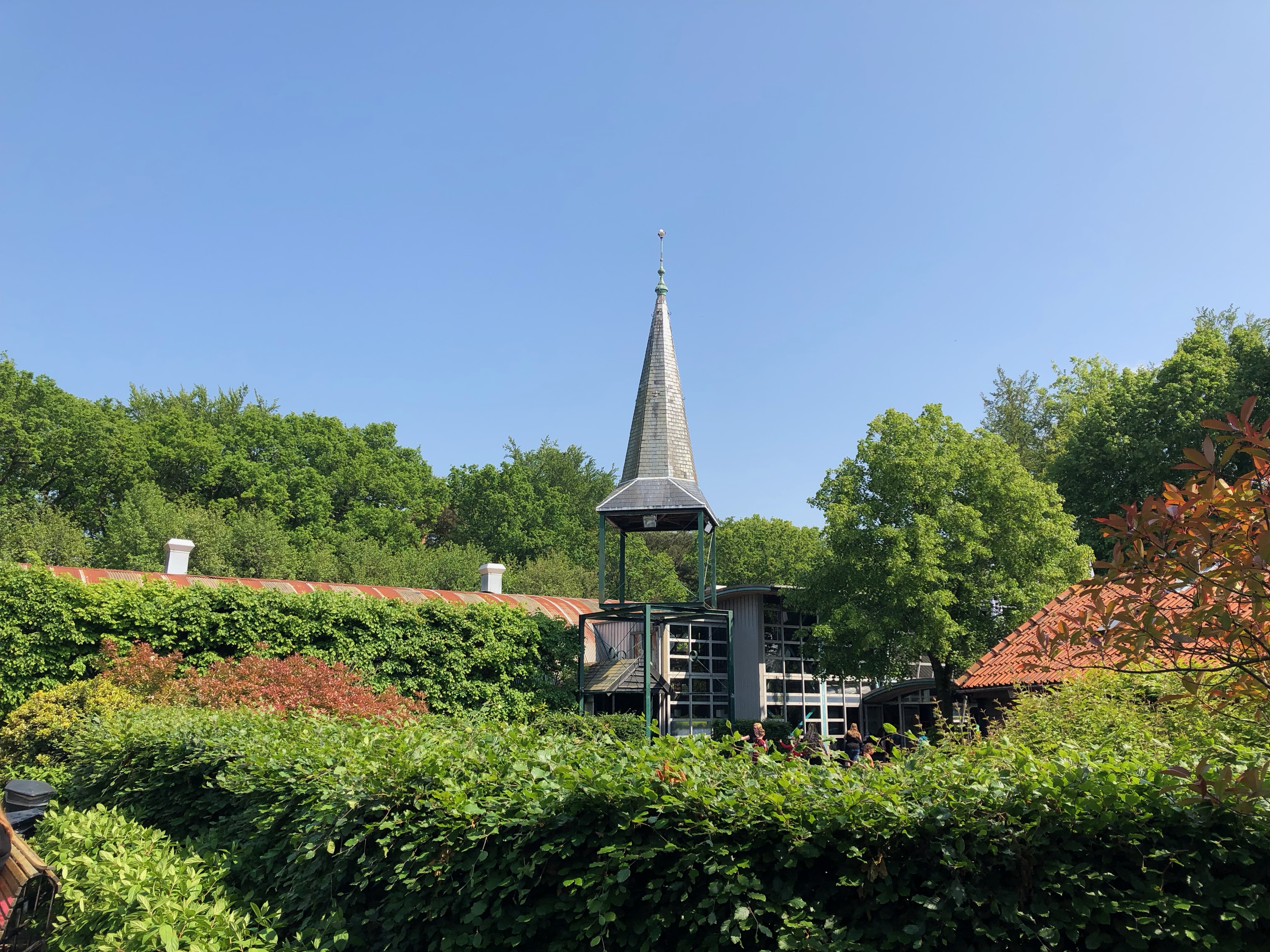 Duinrell